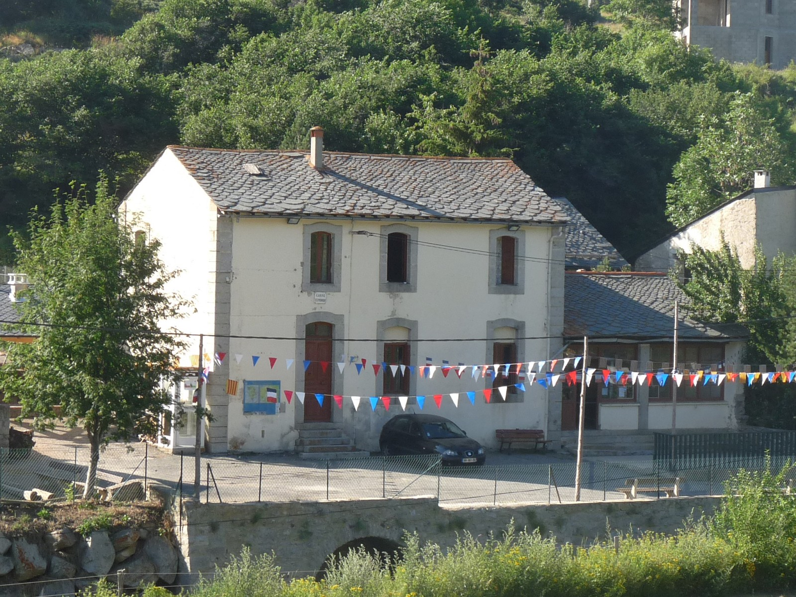 Ancienne école de Caudiès-de-Conflent, Pyrénées-Orientales, France